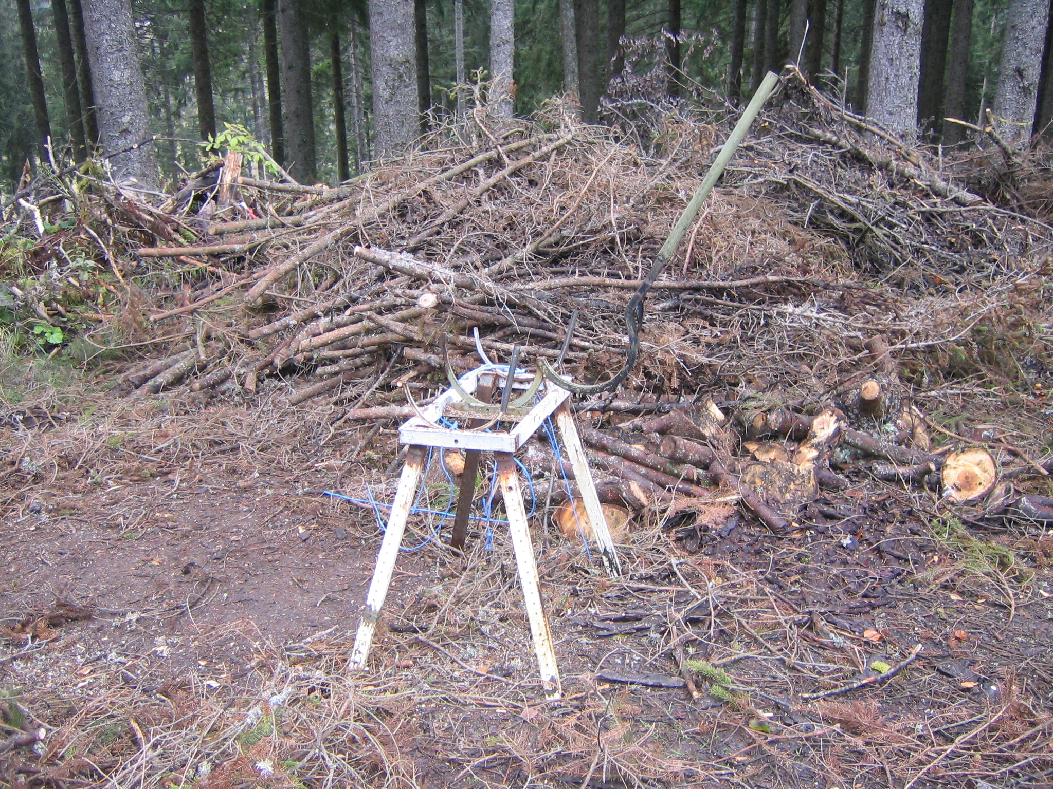 Wellen nennt man im Schwarzwald Bündel aus getrockneten Ästen, die als Brennmaterial genutzt werden. Das Werkzeug, mit dem sie gefertigt werden, heißt Wellenbock